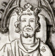 Česky: Odo Pařížský